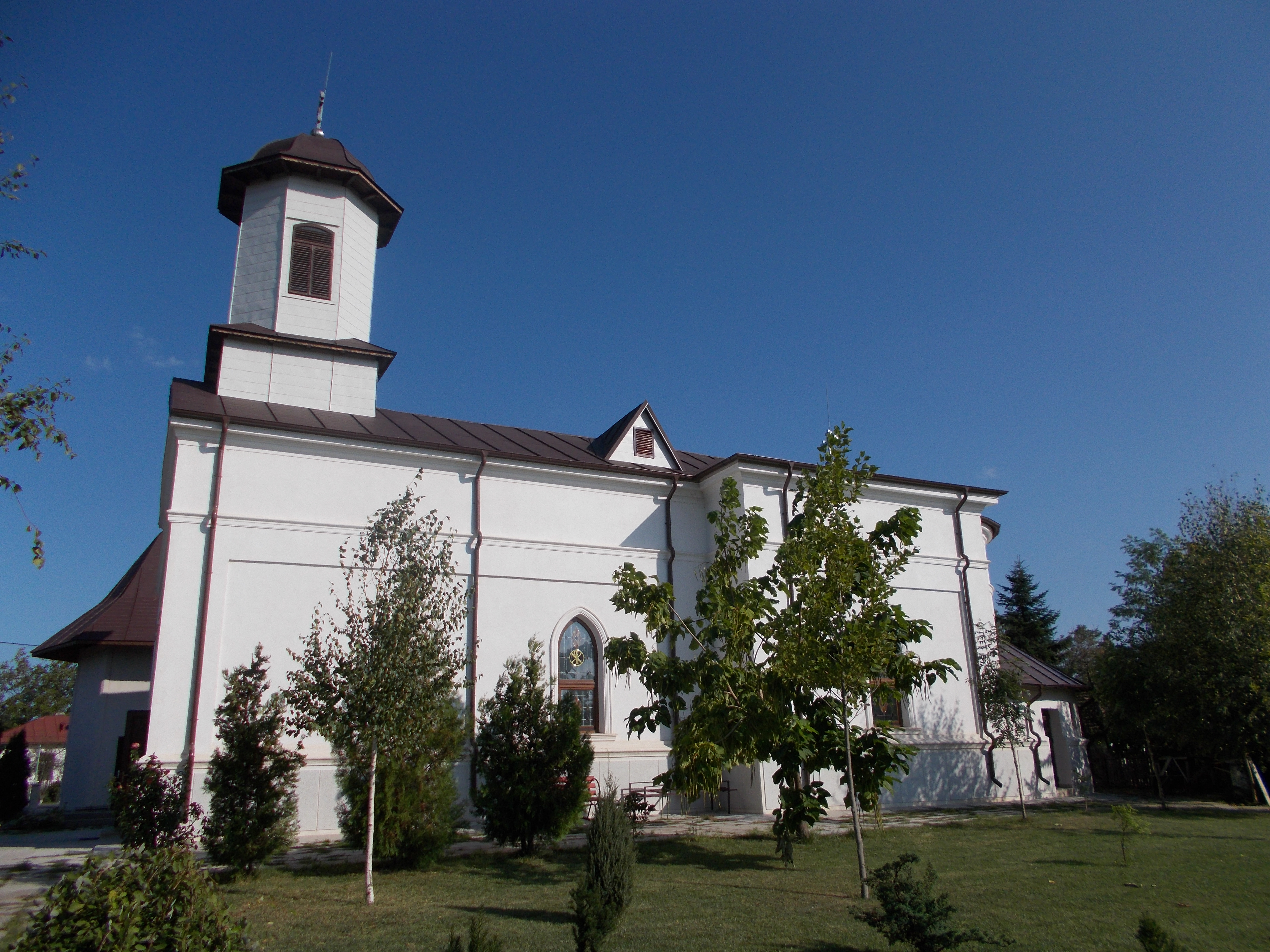 Biserica de zid ”Sf. Gheorghe” din satul Ograda, județul Ialomița 01